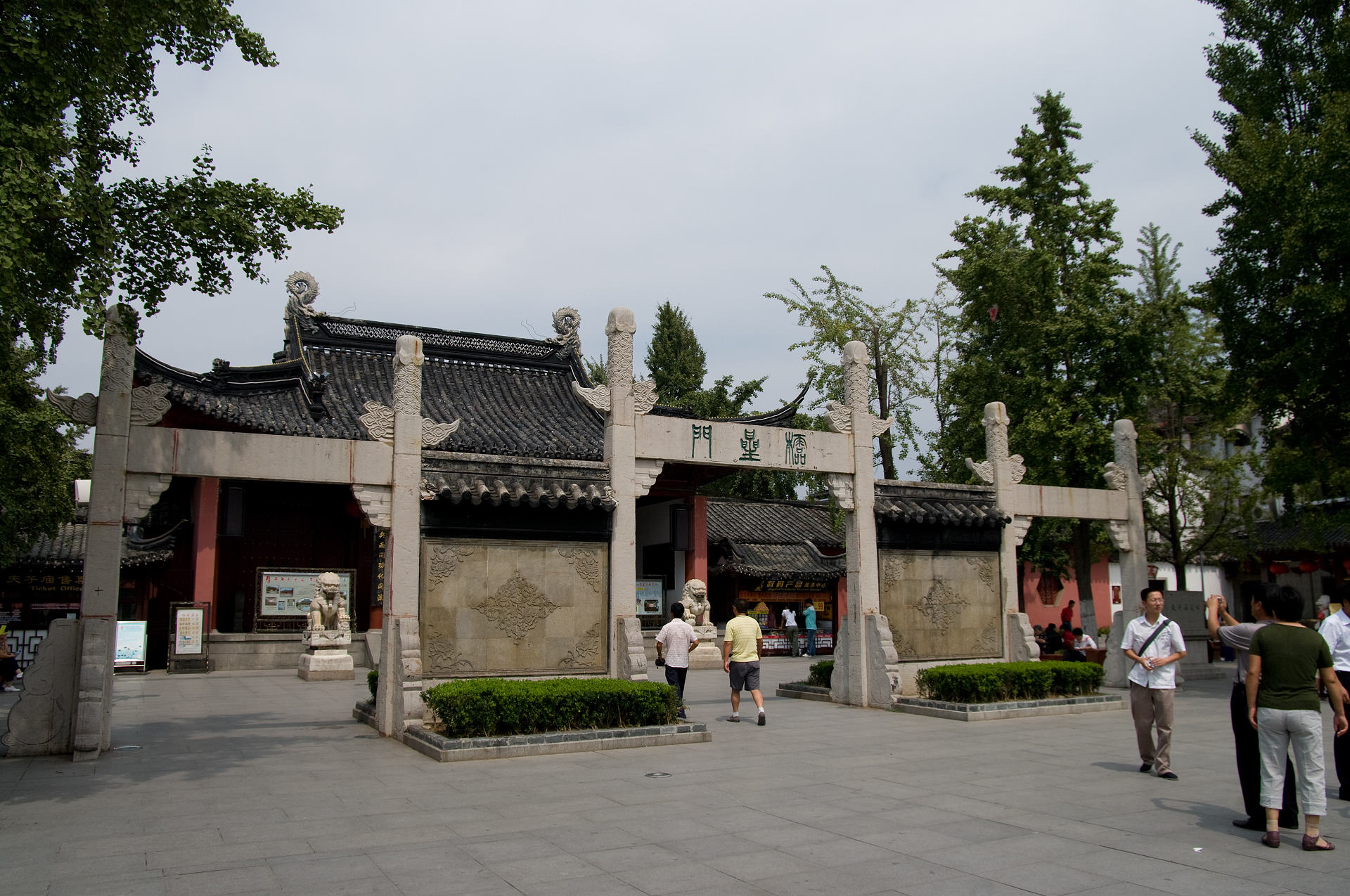 南京夫子廟棂星门